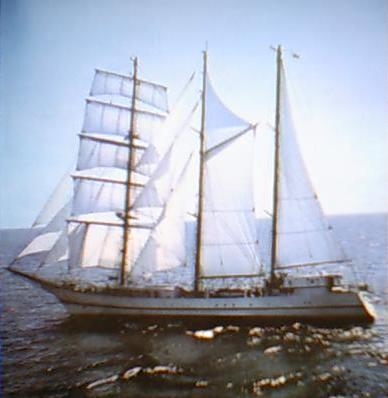 Barkentyna szkolna ORP "Iskra" (II)